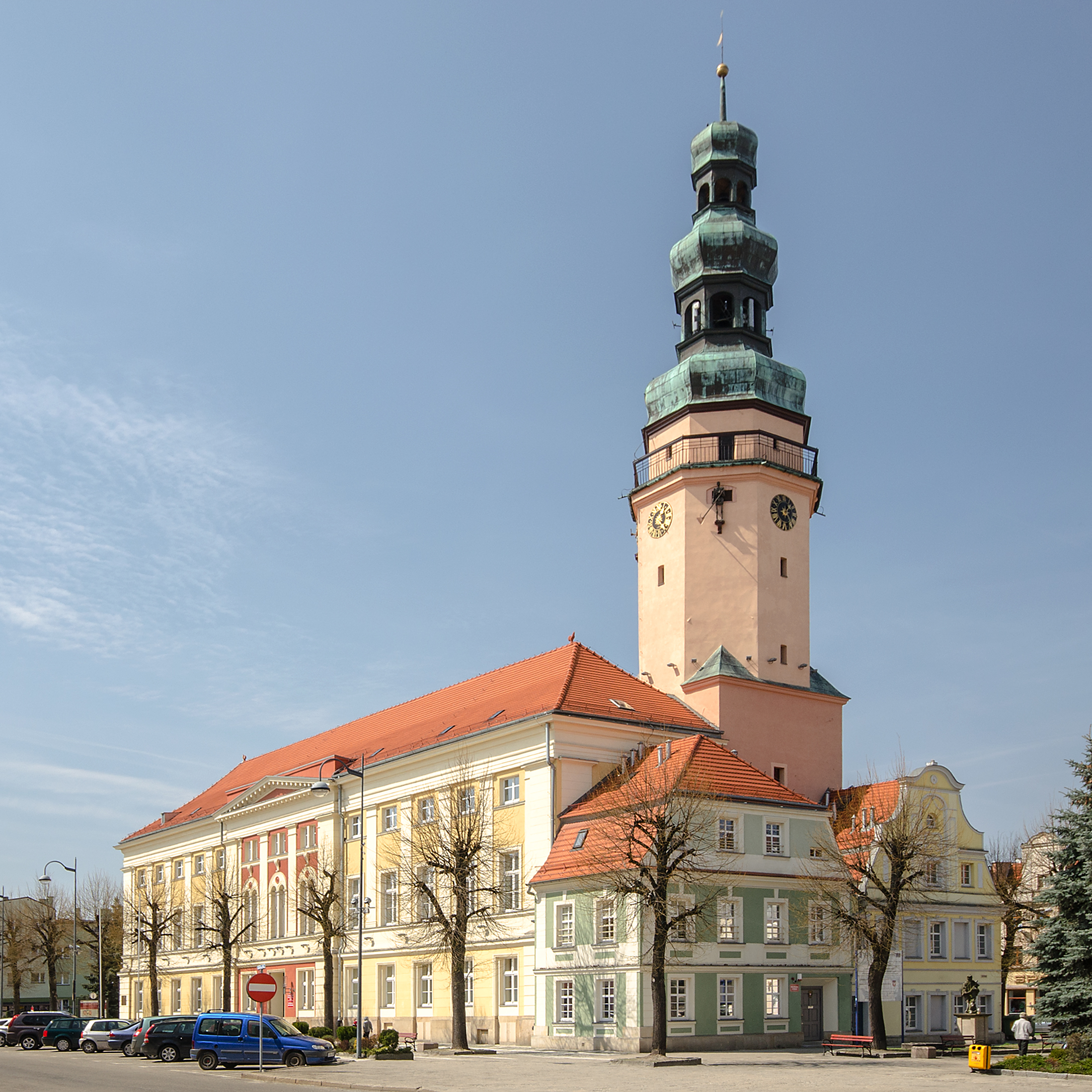 Oława, ratusz, 1585, poł. XVII, 1823